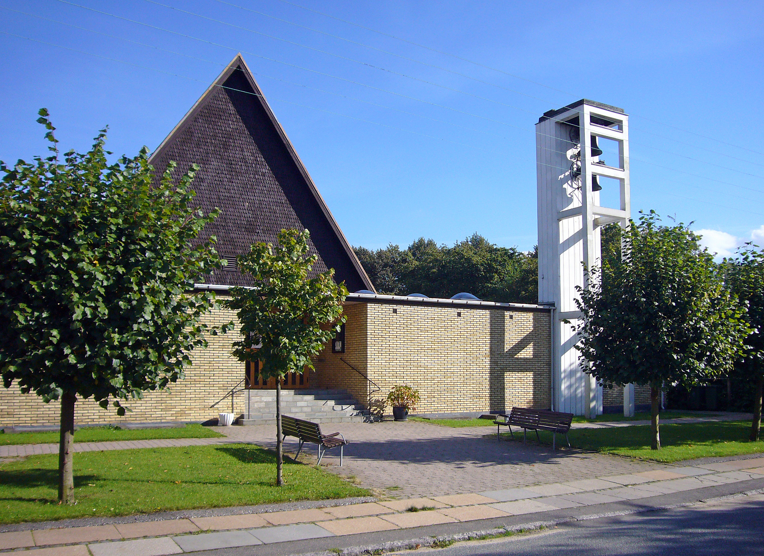 Emdrup Kirke, Copenhagen, Denmark. Emdrup Kirke